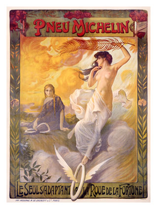 Affiche Pneu Michelin. M. de Brunoff et Cie, Paris